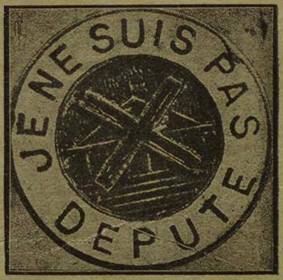 Insigne "Je ne suis pas député" porté par les sympathisants des ligues lors de la crise du 6 février 1934.